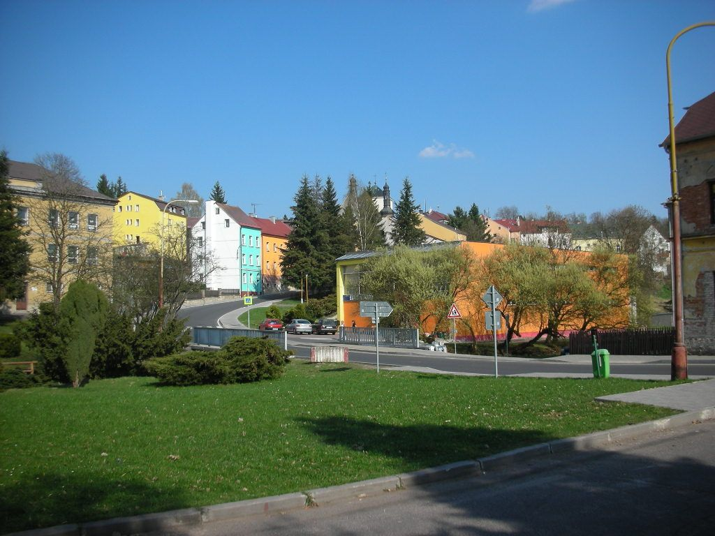 Zentrum von Luby, Tschechien